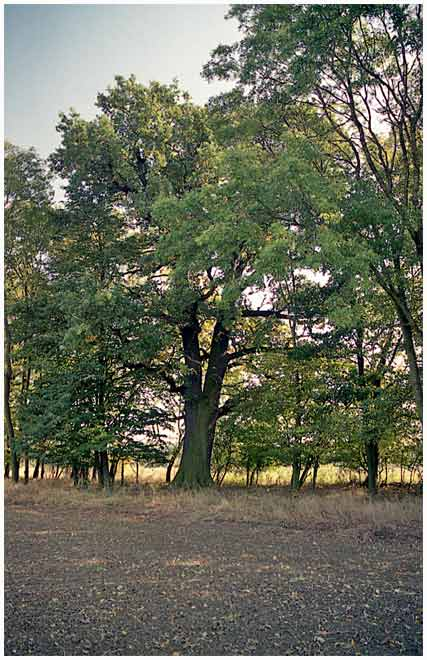 Dobřenický dub